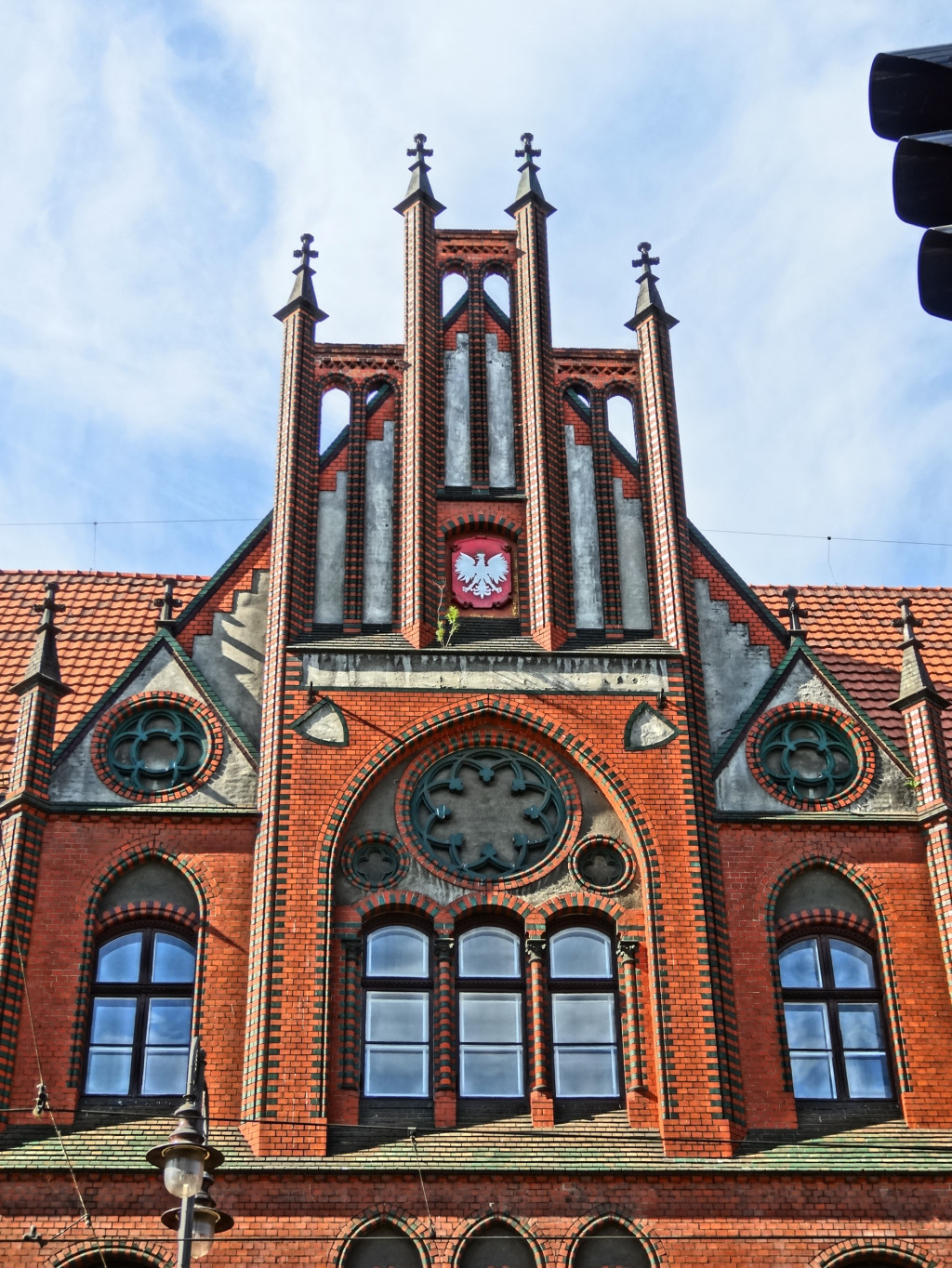 Budynek Poczty Głównej w Bydgoszczy przy ul. Jagiellońskiej (zbud. 1883 skrzydło płd, 1899 skrzydło płn)